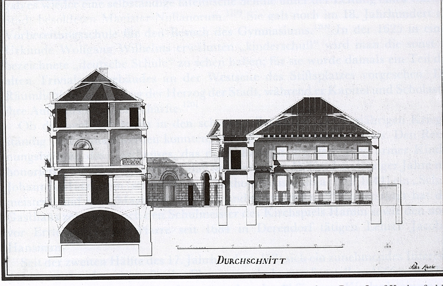 t